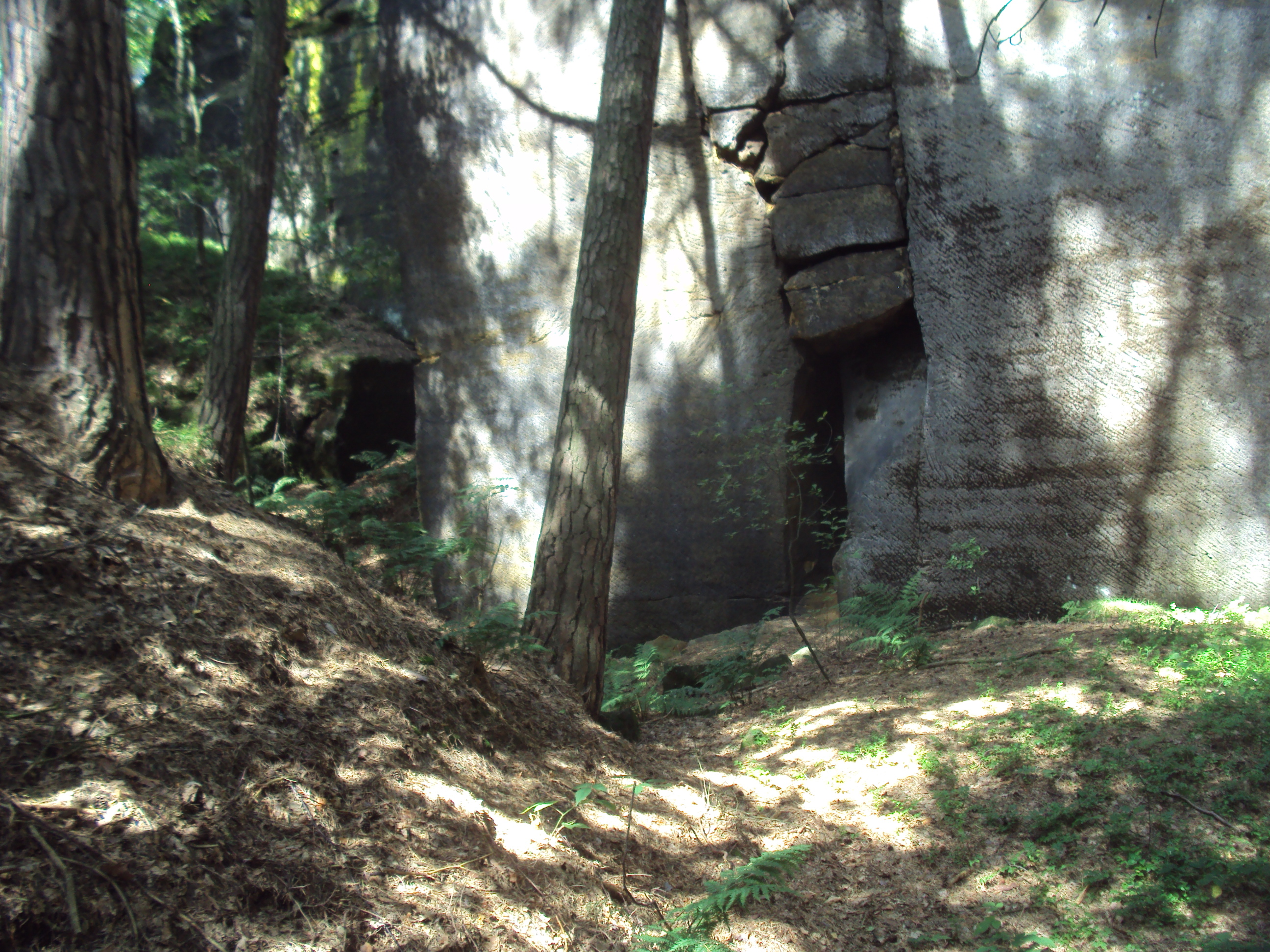 Pod vrcholem byl kamenný lom